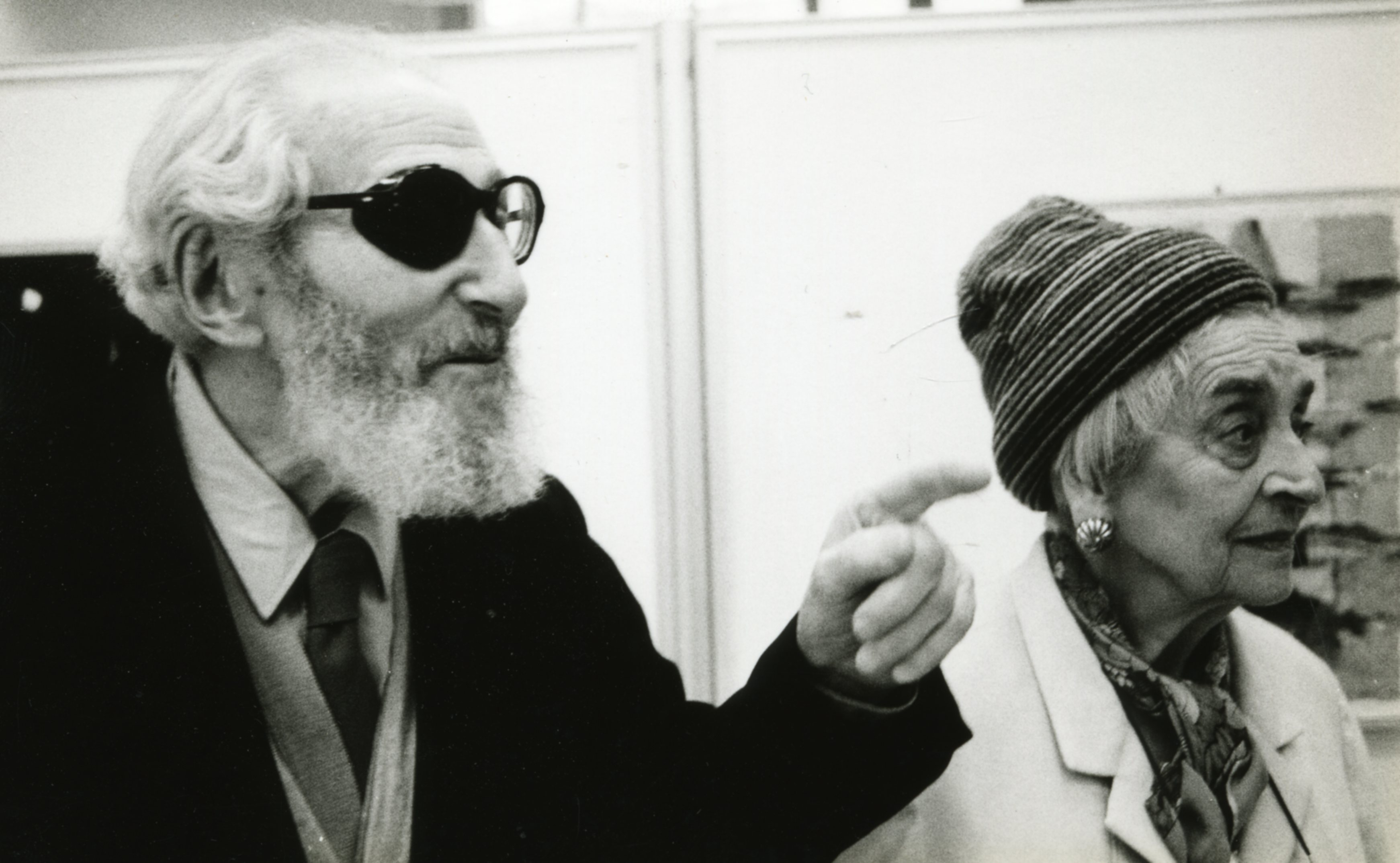 L'écrivain français et son épouse à Paris en 1989.